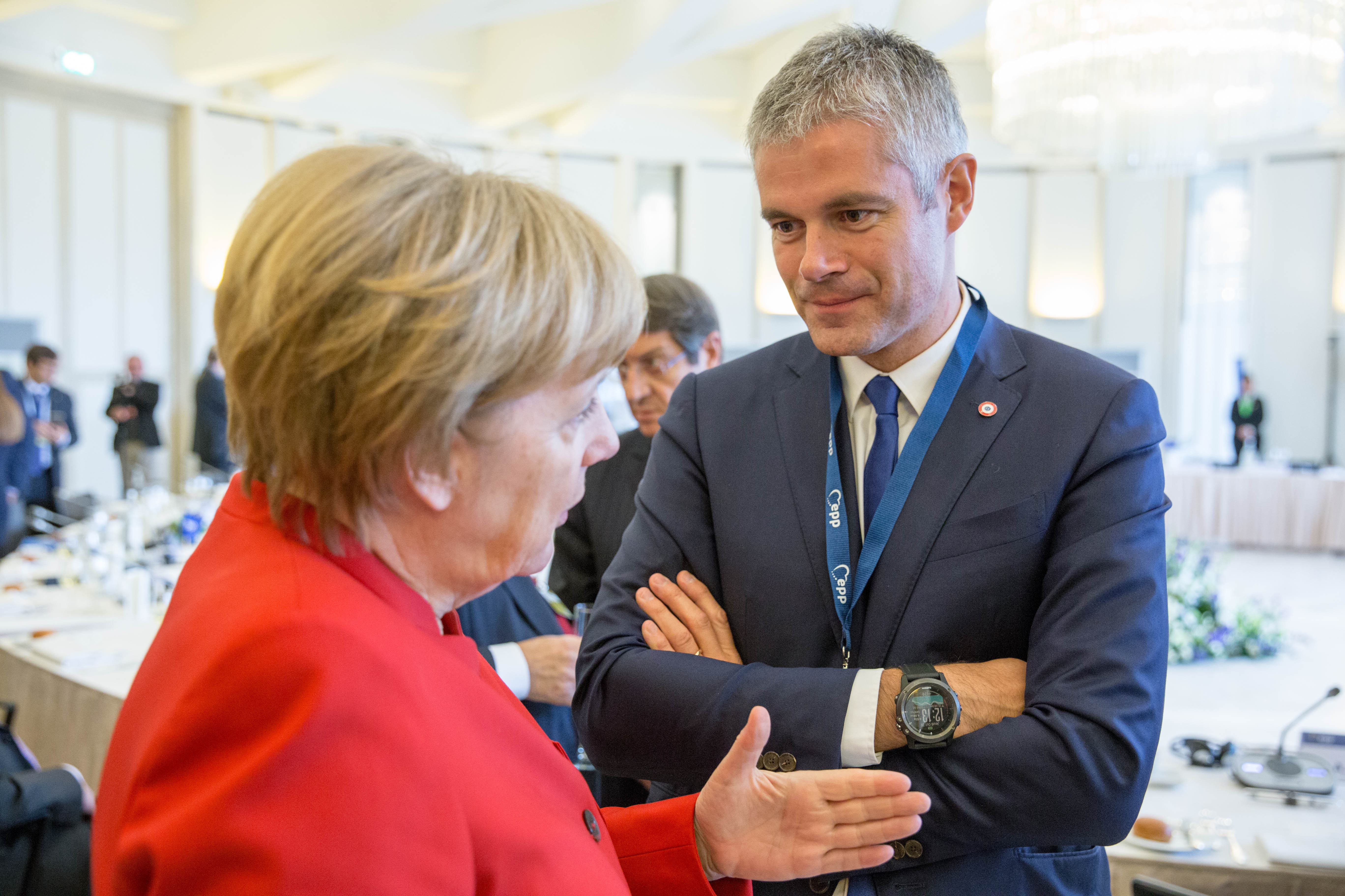 EPP Summit, Maastricht, October 2016